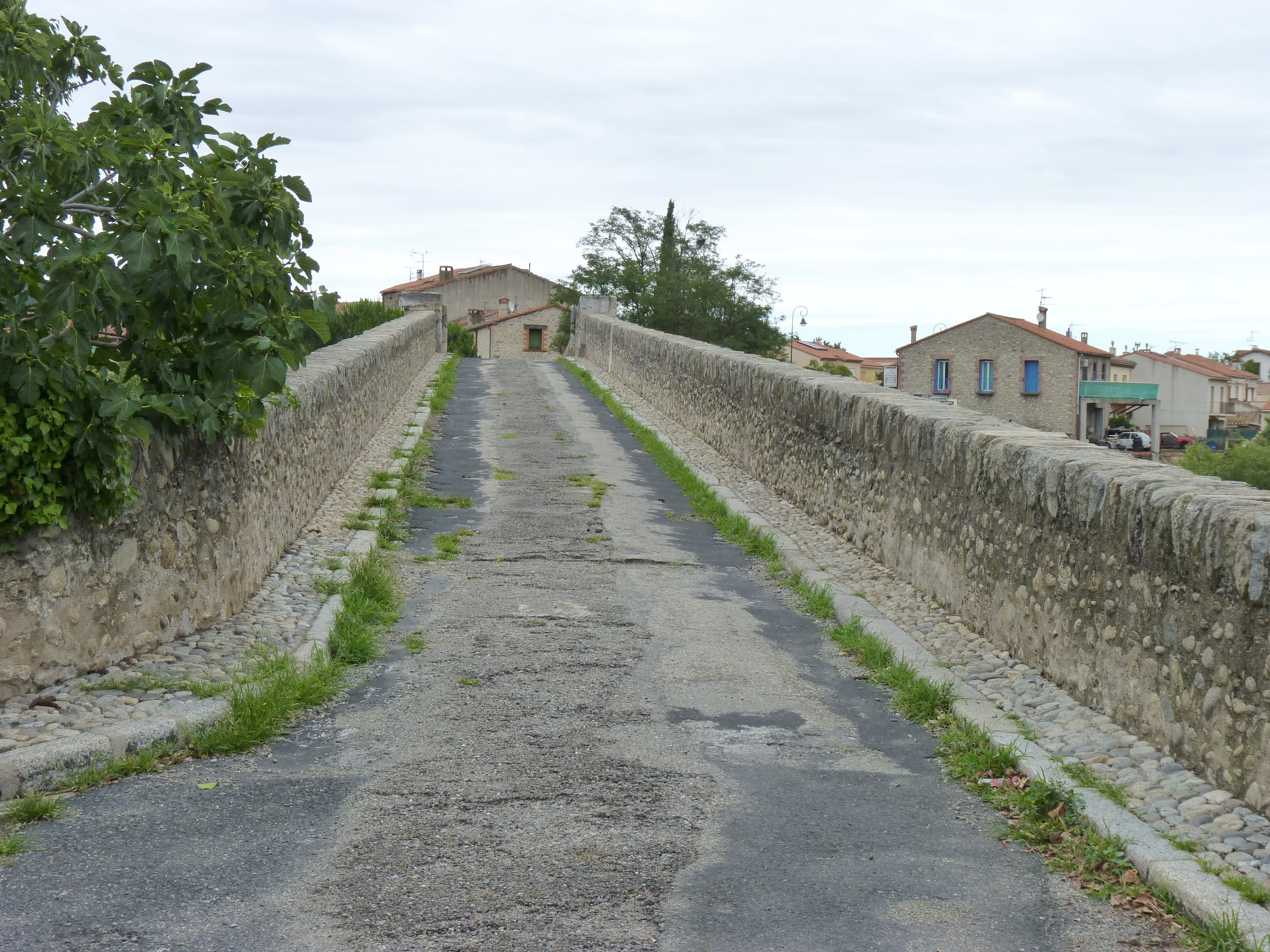 Pont du Diable, Céret (Pyrénées-Orientales, Languedoc-Roussillon, France)